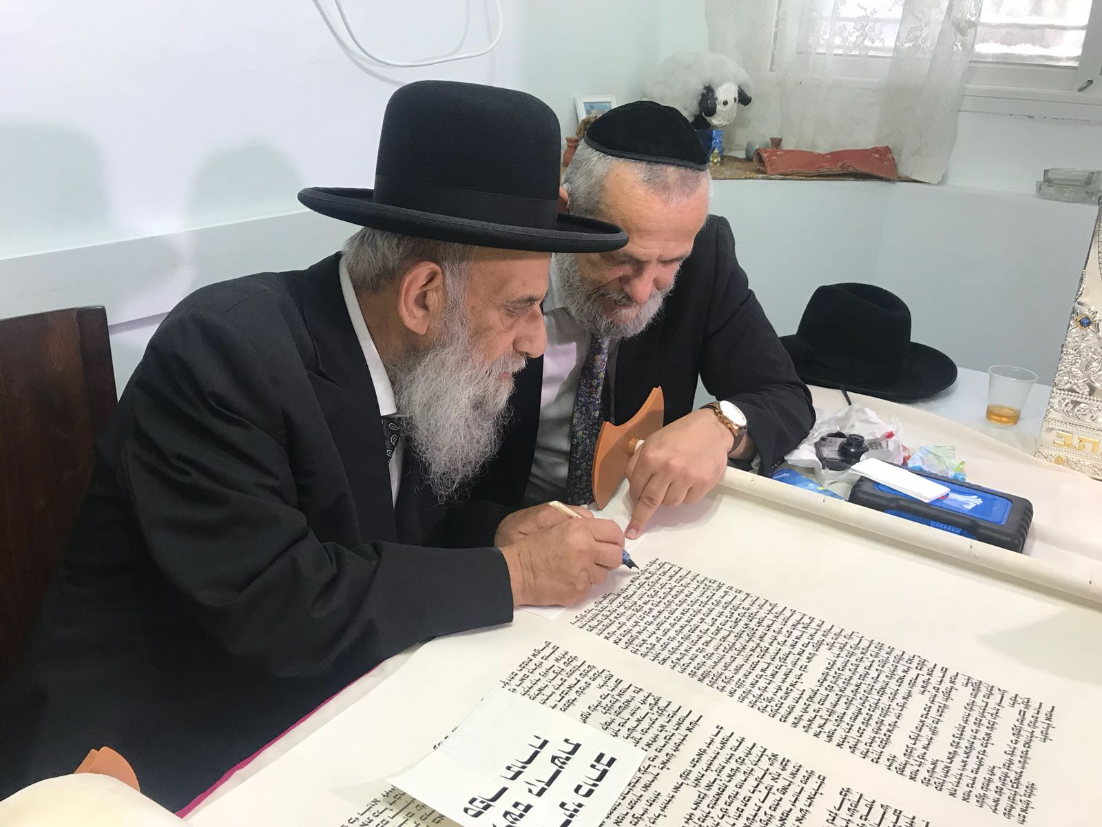 הרב דוד צדקה, הרב הראשי לפרדס חנה כרכור